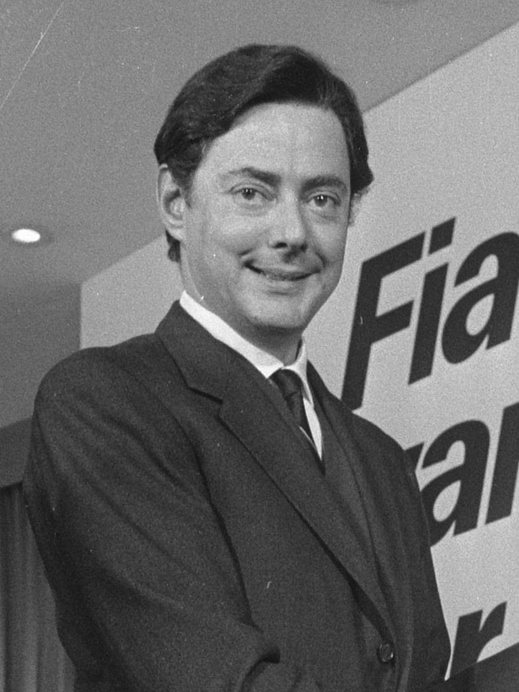 Fiat 128 auto van het jaar. Links dr. Numberto Agnelli ontvangen de trophee in Hilton Amsterdam.